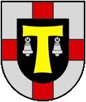 Wappen der Ortsgemeinde Greimersburg, Landkreis Cochem-Zell